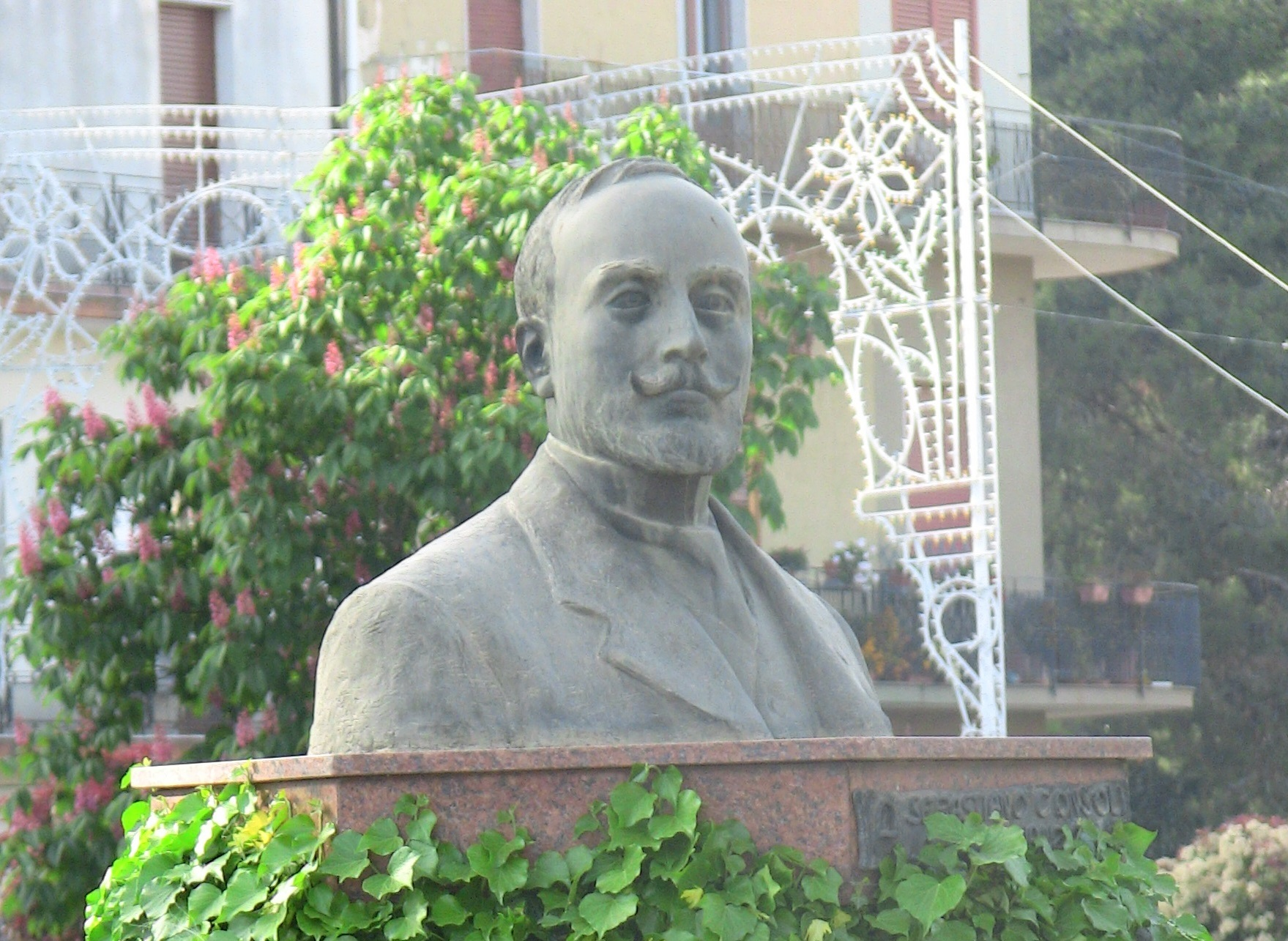 Busto di Sebastiano Consoli a Trecastagni